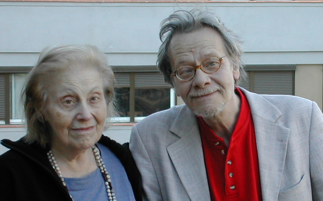 Genomen tijdens het bezoek van Jochem Slothouwer en zijn vrouw Edith Grosz bij mij in Barcelona.